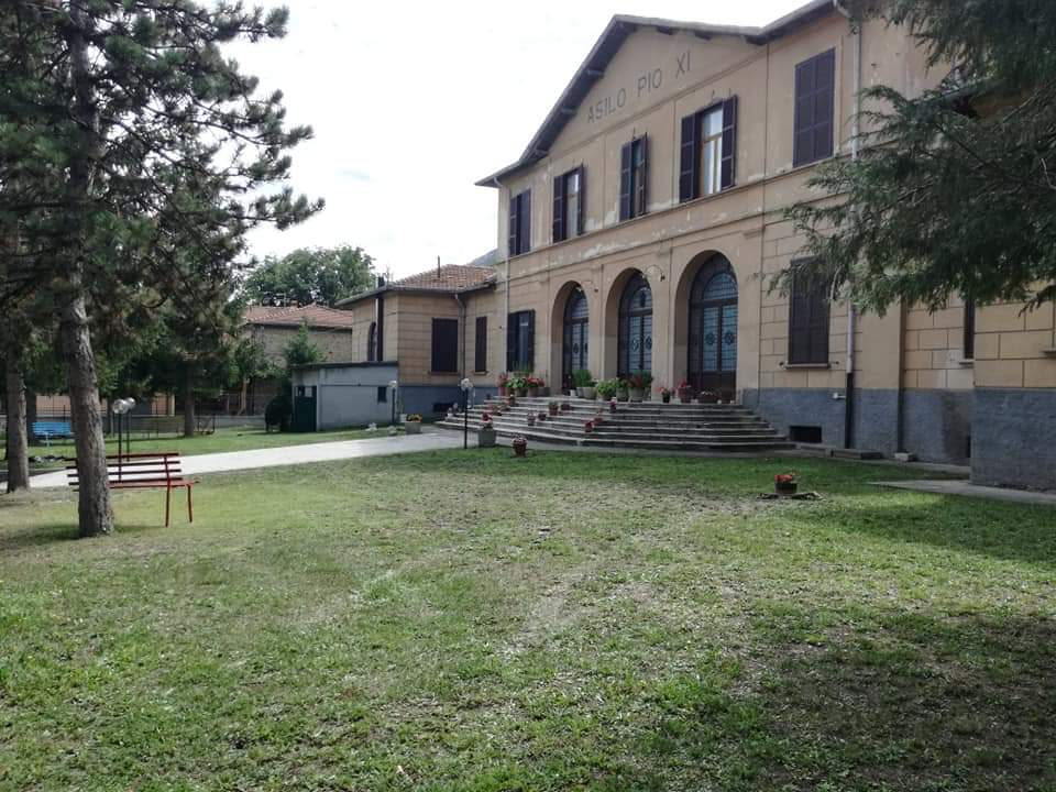 Scuola